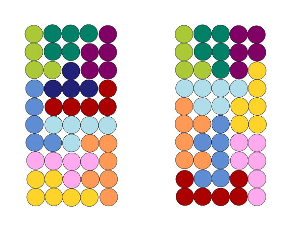 Two example solutions of the puzzle game IQFit, one using ten pieces (left), the other using nine pieces (right)